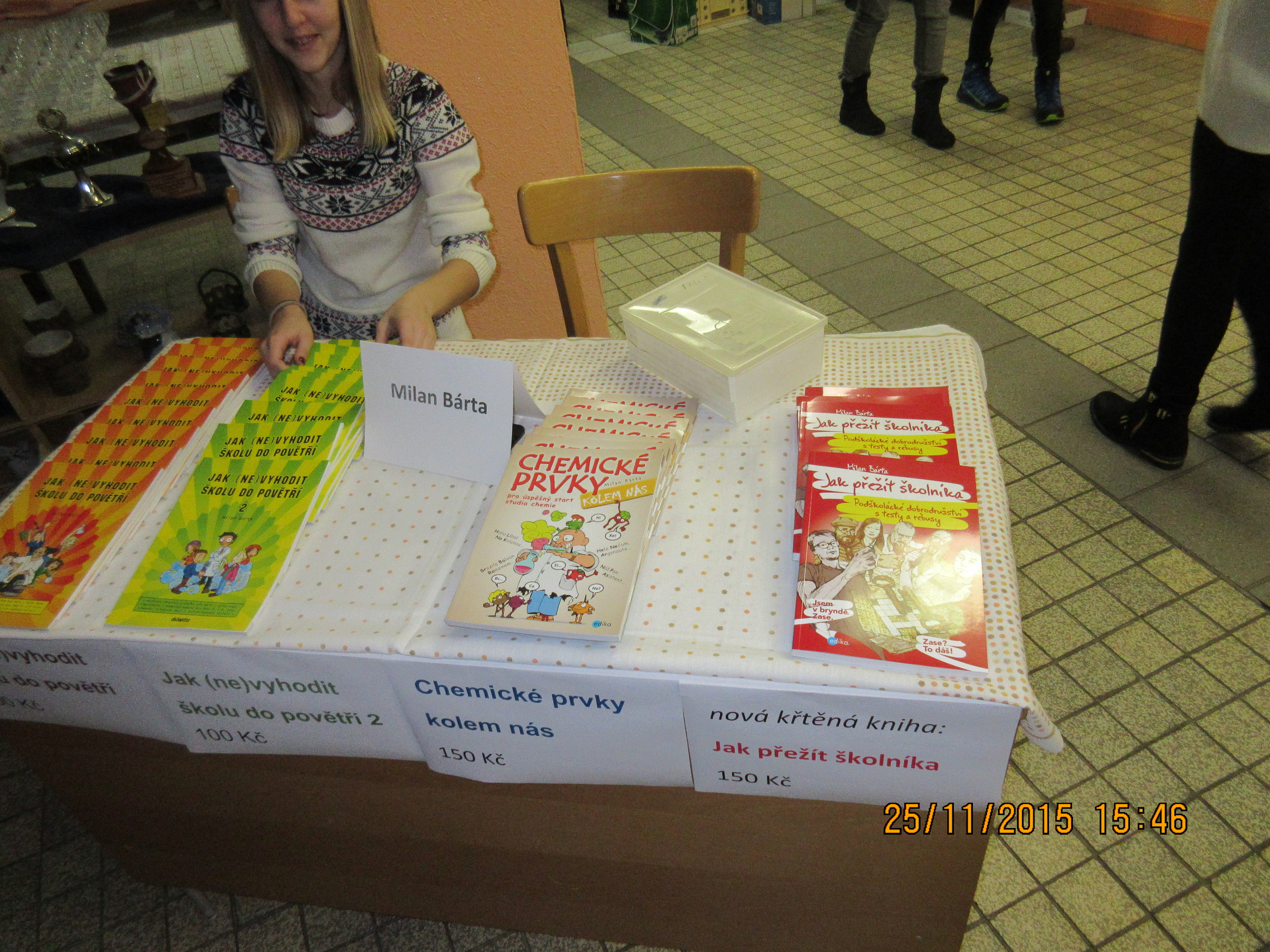 Knihy pana Bárty při křtu jeho další ve škole ZŠ Špičák